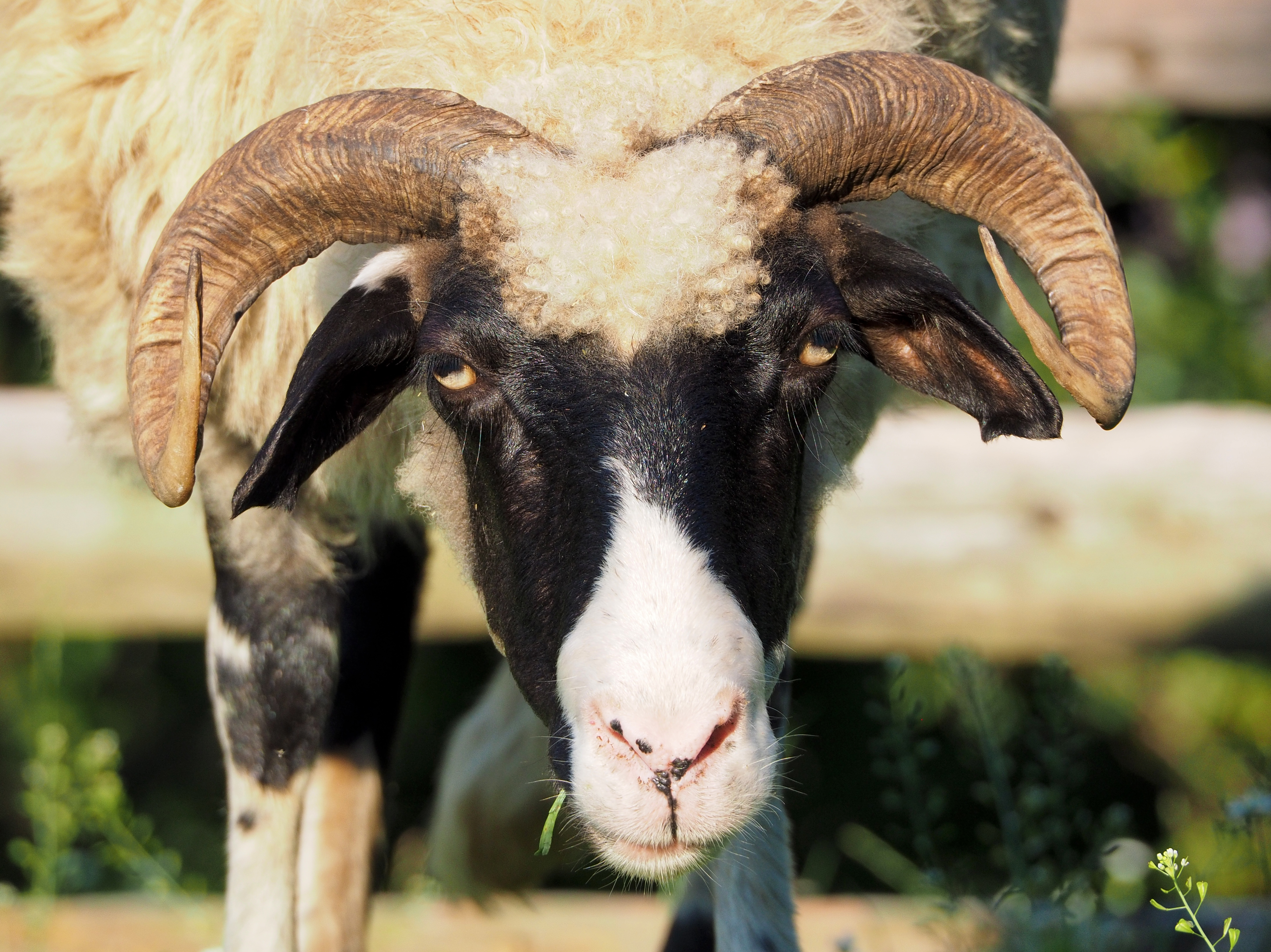 Srpski (latinica): Pramenka glava (Bosna)